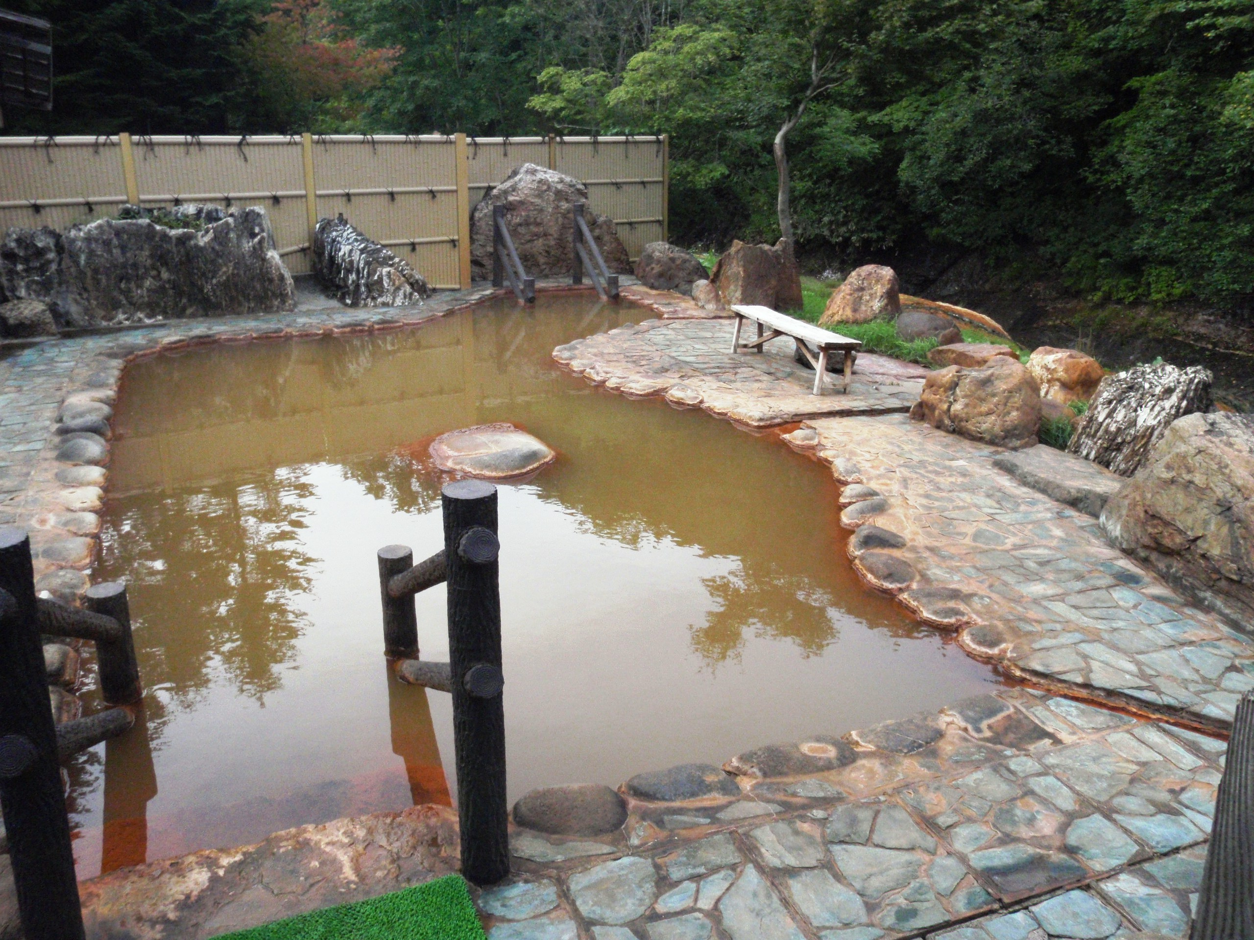 八雲温泉おぼこ荘露天風呂